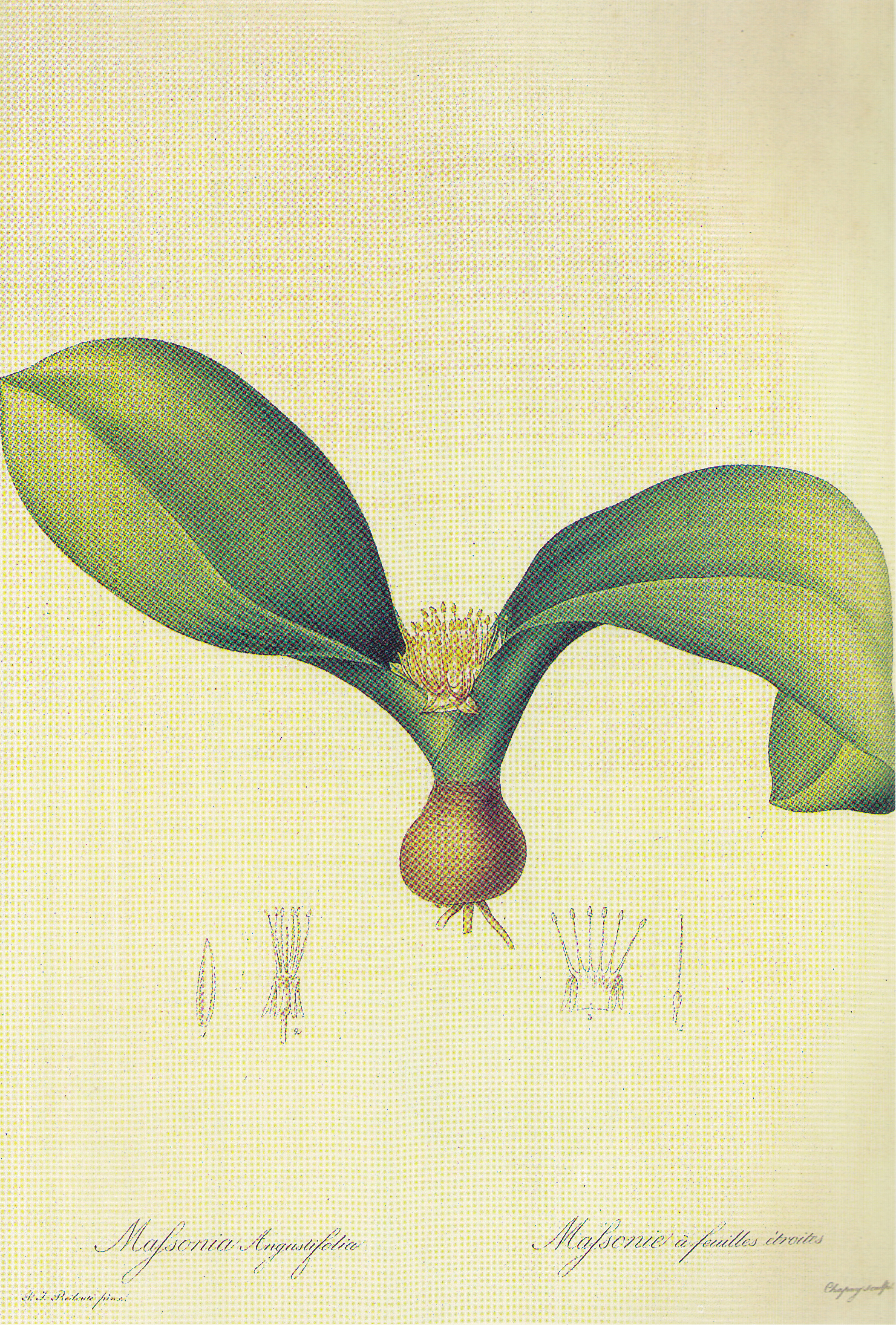 糖罐。原产于南非。